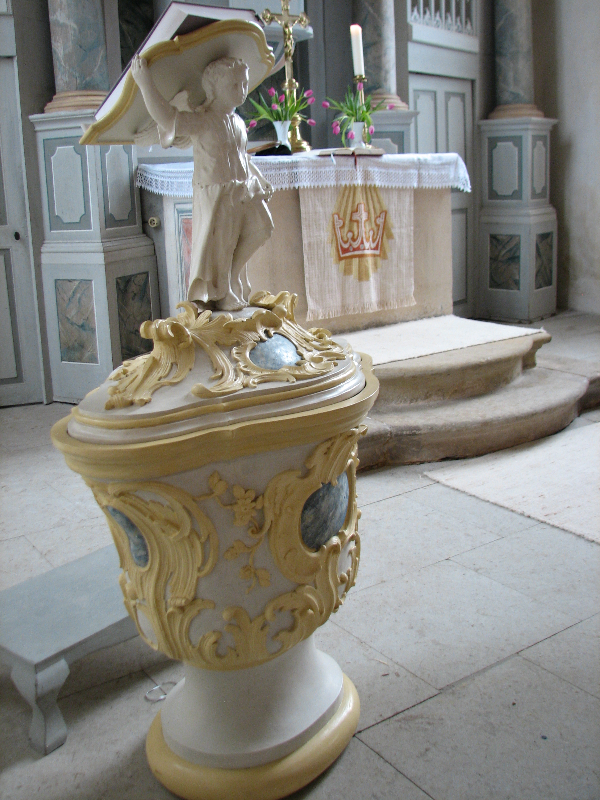 Tauflese